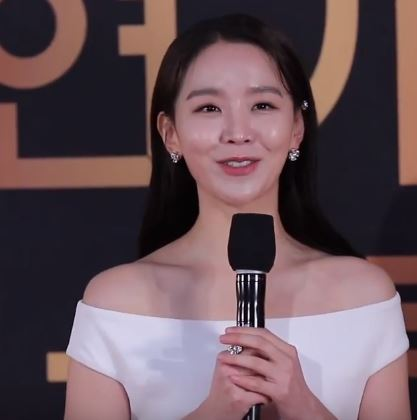 12월 31일 오후 서울시 영등포구 여의도 KBS 신관 웨딩홀에서 '2019 KBS 연기대상' 레드카펫 행사가 열려 '단 하나의 사랑' 배우 김명수, 신혜선이 참석해 포토타임을 갖고 있다.